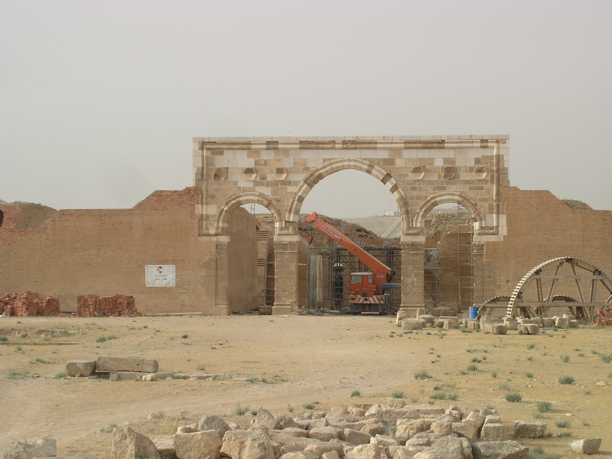 Mshatta - umayyadisches Wüstenschloss in Jordanien. Front mit aufgerichtetem Tor.